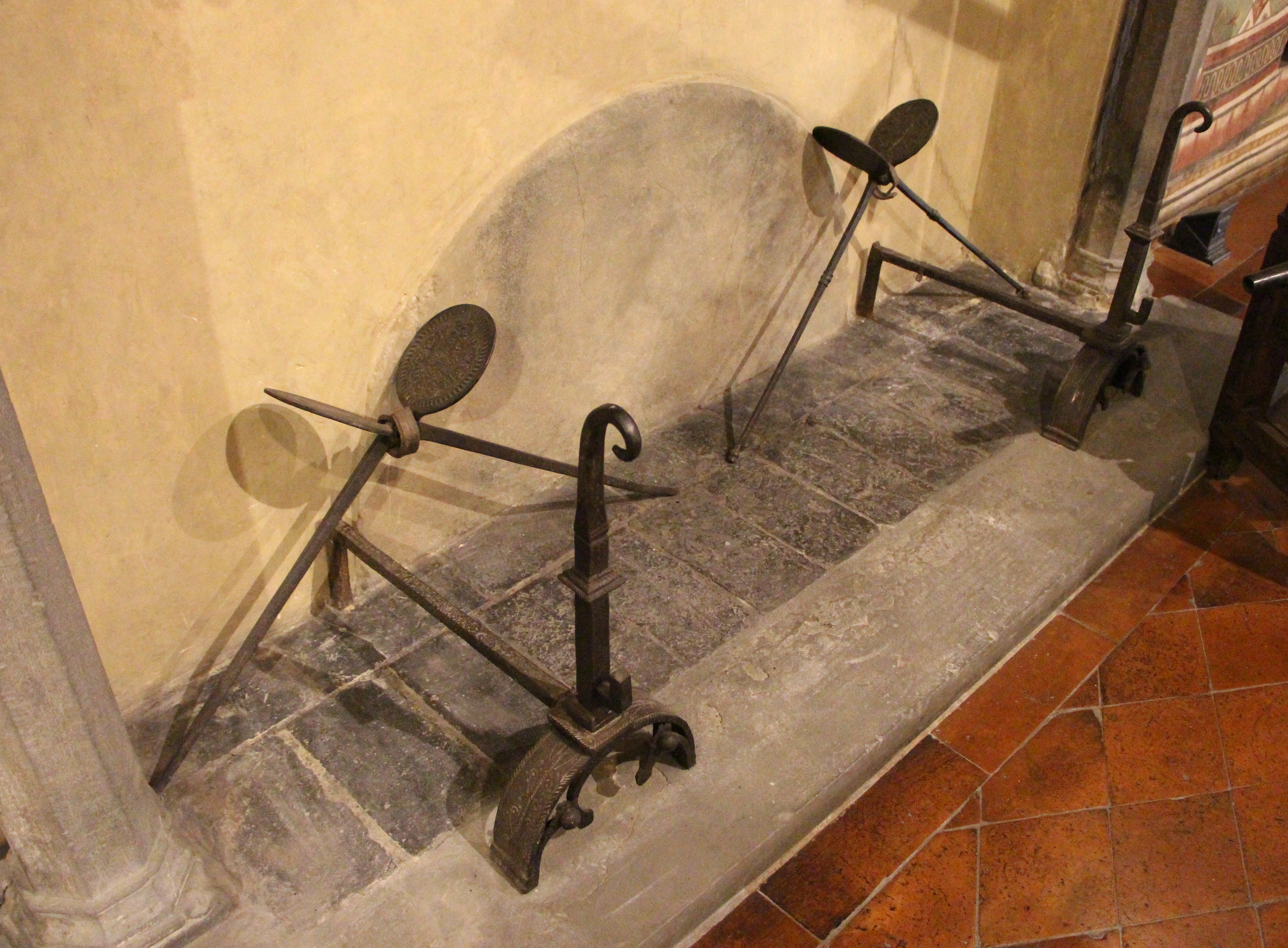 Museo della Casa fiorentina Antica - Palazzo Davanzati - MIBAC The making of this document was supported by Wikimedia CH. (Submit your project!) For all the files concerned, please see the category Supported by Wikimedia CH. This is a photo of a monument which is part of cultural heritage of Italy.